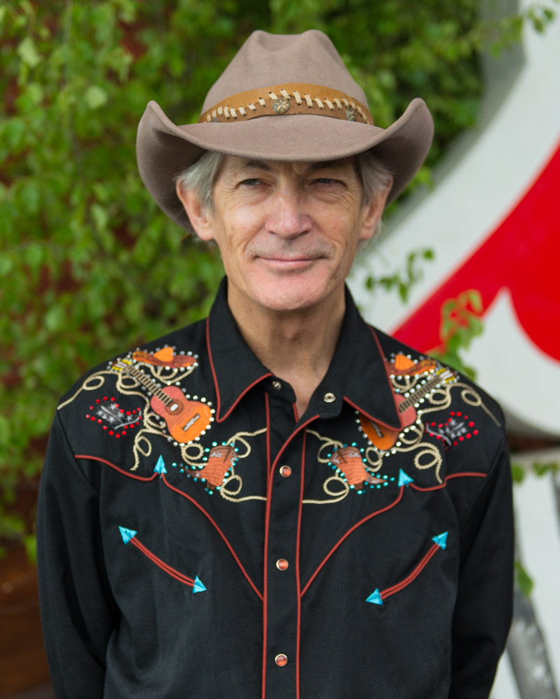 Doug Seegers var en av artisterna för Allsång på Skansen som presenteras den 10 juni 2015 på Skansen i Stockholm.